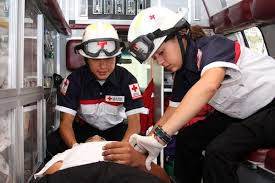 EL DEBER DE UN PARAMEDICO